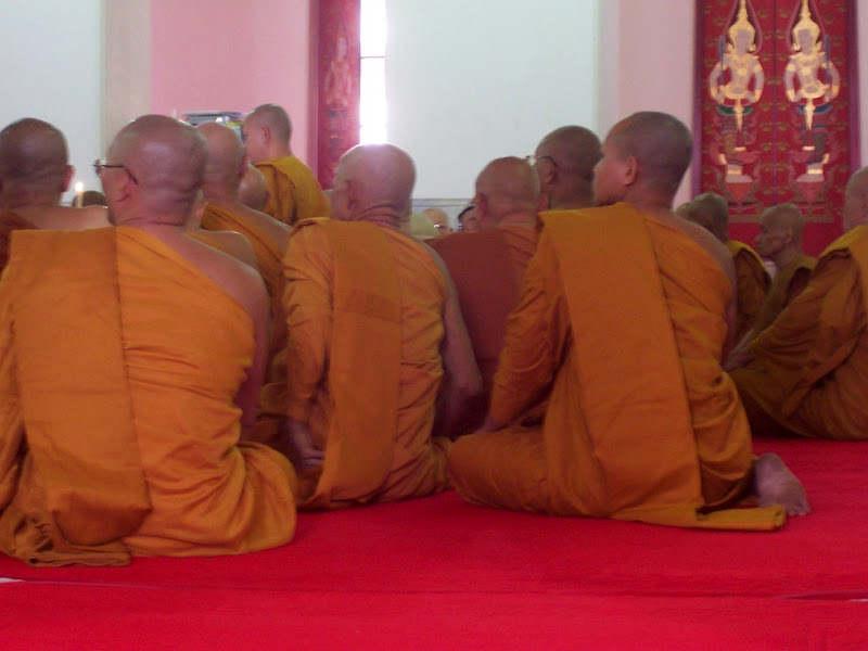 Tayland Budist Kesisler